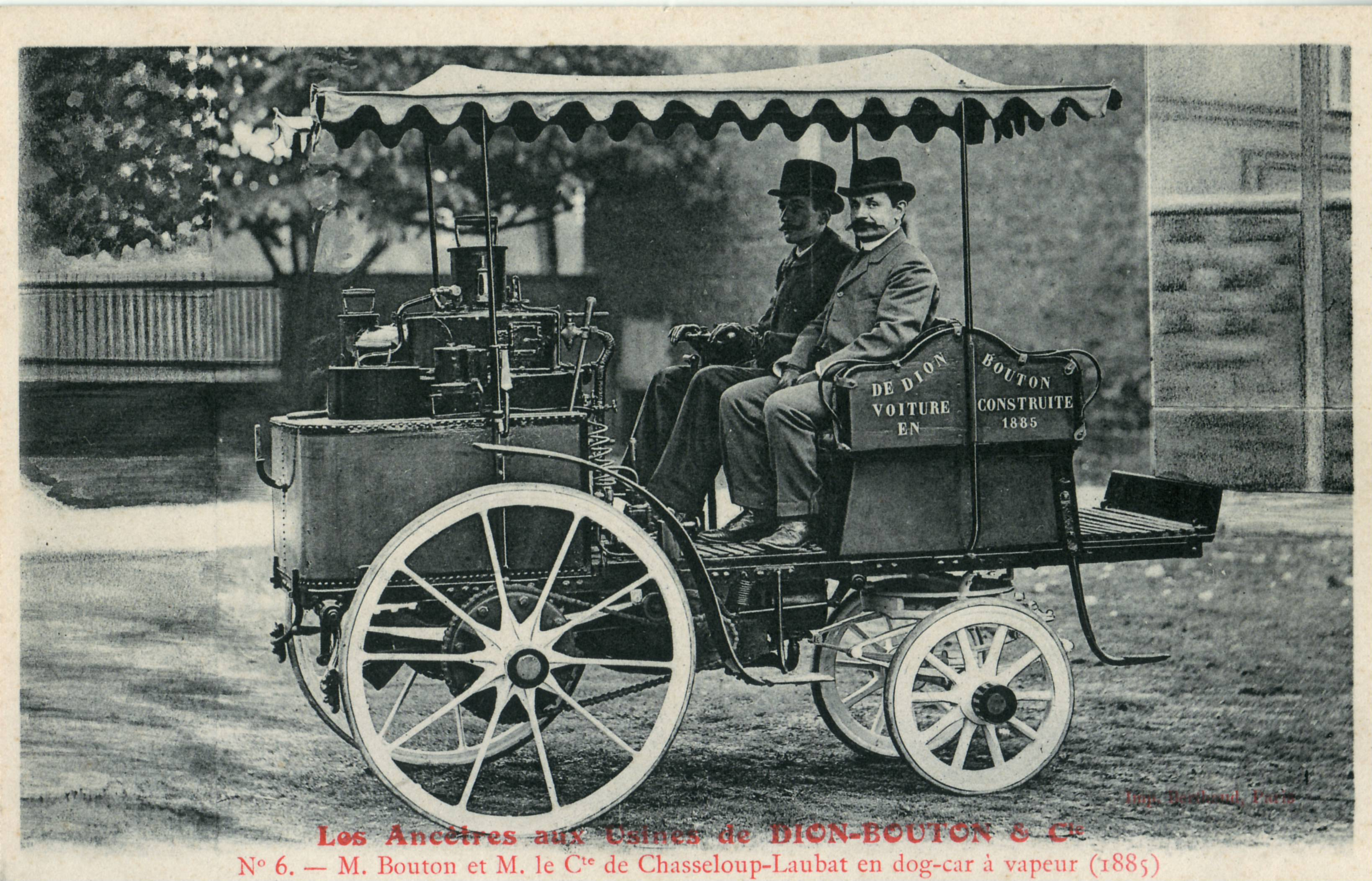 Carte postale ancienne éditée par De Dion-Bouton: Les ancètres aux Usines de Dion-Bouton 6 - M. Bouton et M. le Comte de Chasseloup-Laubat en dog-car à vapeur (1885)